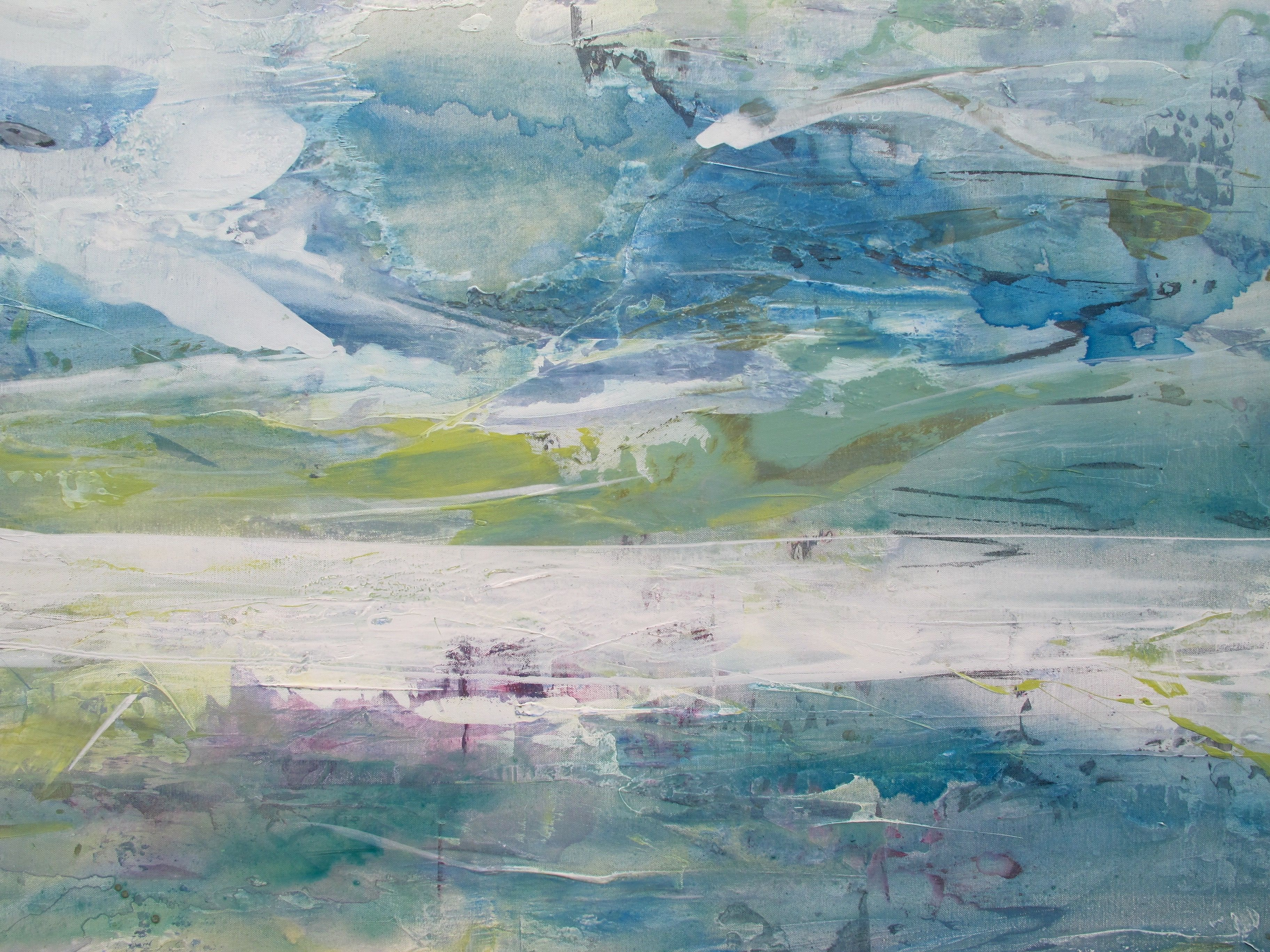 Eva Maria Enders, Sichtweisen IV, 2015 Mischtechnik auf Leinwand, 120 x 90